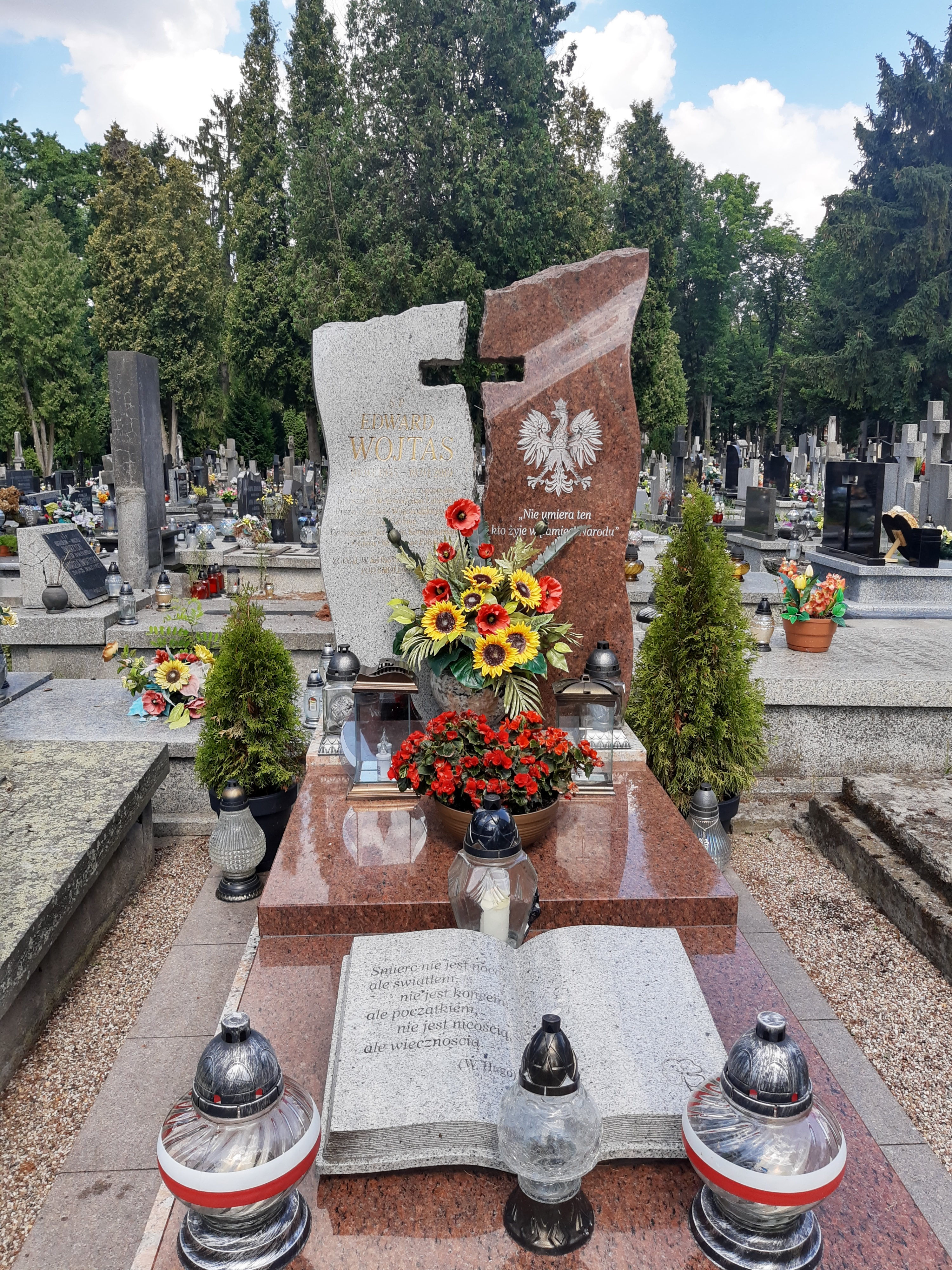 Grób Edwarda Wojtasa na cmentarzu przy ulicy Lipowej